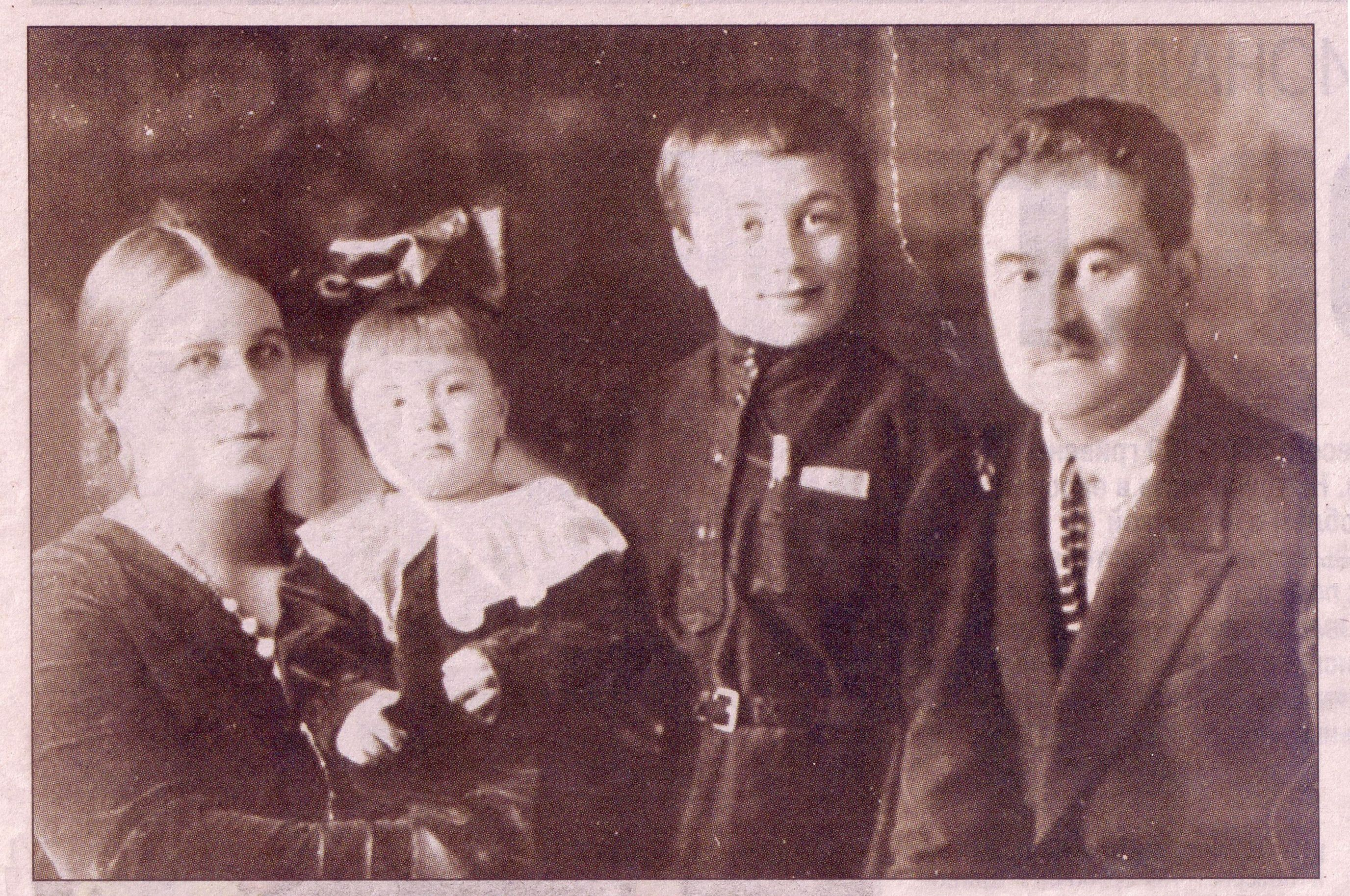 Валентин Михайлович Кульчицкий с семьёй (сын, поэт Михаил Кульчицкий, в центре). Харьков. Конец 1920-х годов.